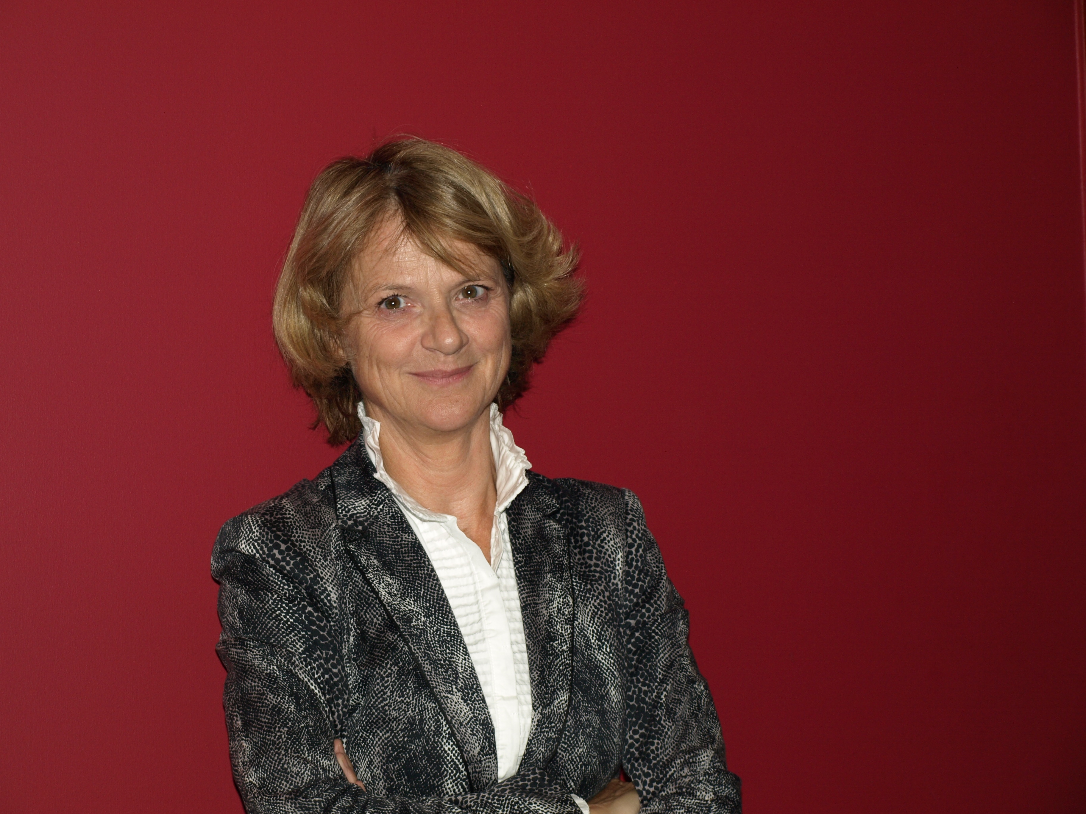 Tisková konference k filmu Jako nikdy Autor snímků Blanka Borová pro & 10Mpix.cz